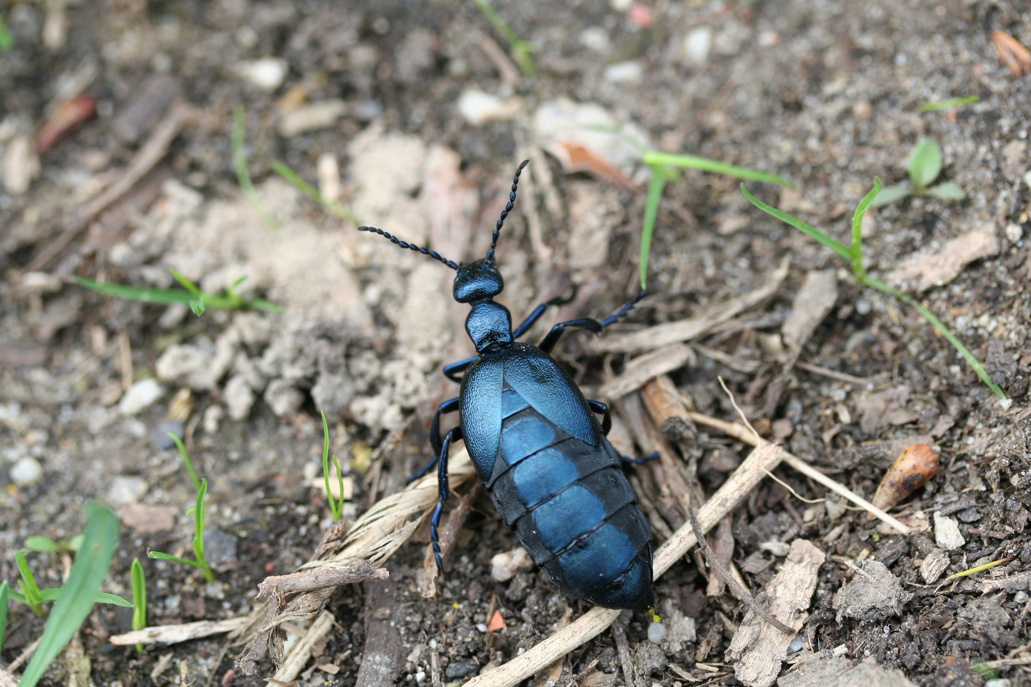 Schwarzblauer Ölkäfer Beobachtungsort: Lebus/Brandenburg